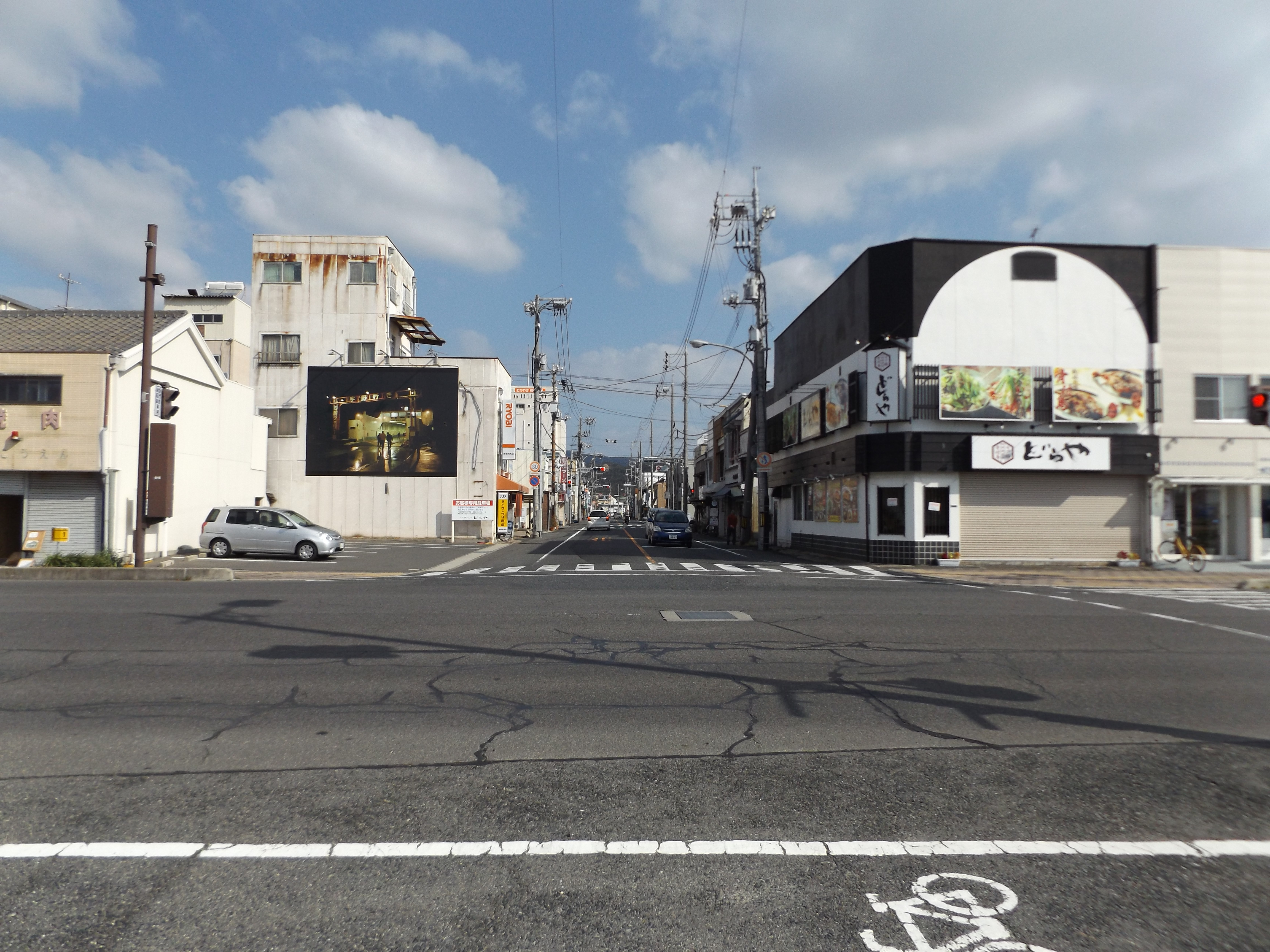 岡山県玉野市の宇野港口交差点。国道30号と岡山県道22号倉敷玉野線の交点で、岡山県道22号の終点でもある。